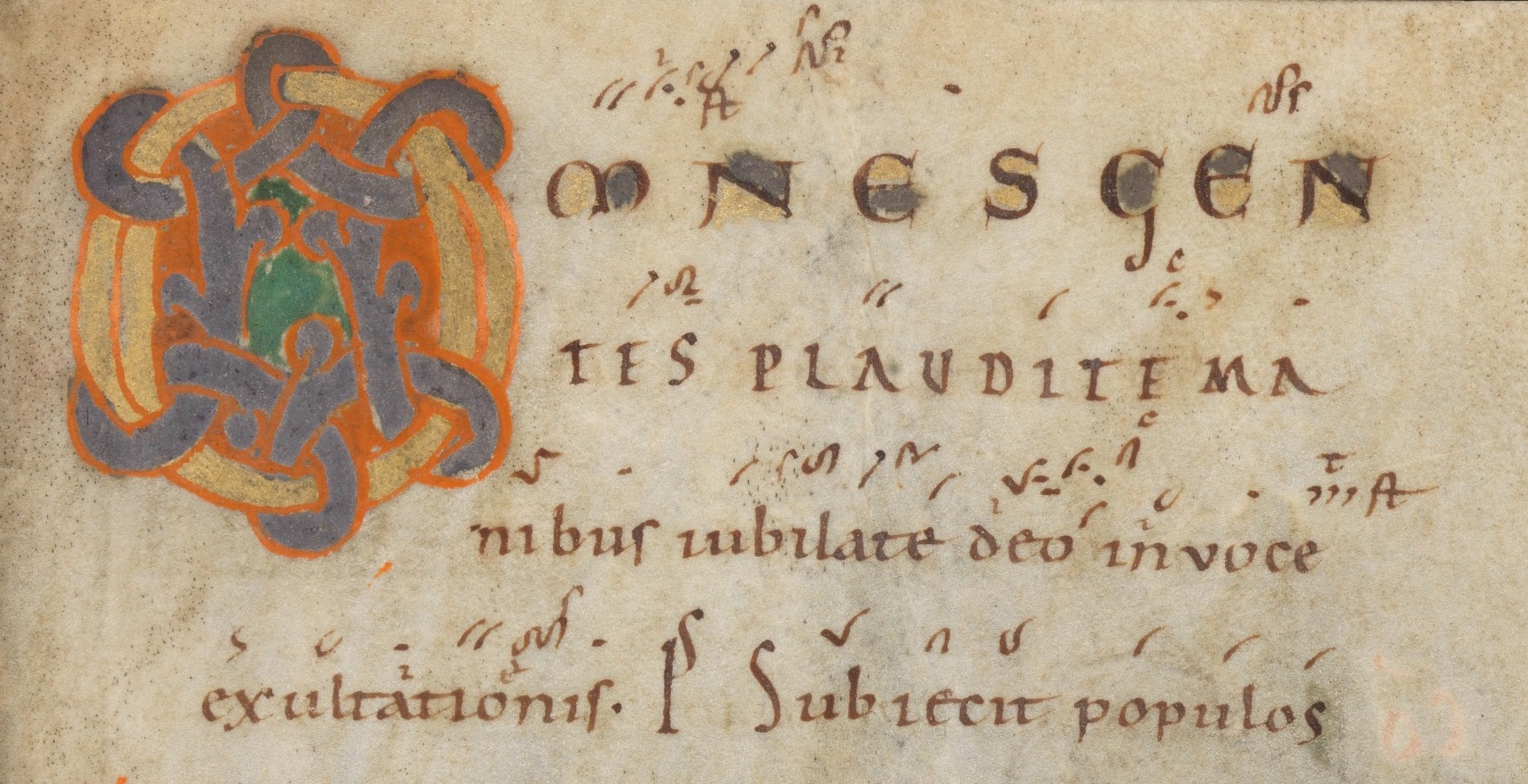 Antiphon zum 13. Sonntag im Jahreskreis aus Psalm 46 (Vulgata) / Psalm 47 (Hebräische Bibel) mit Neumen im Antiphonar Codex Einsidlensis 121, 2. Hälfte 10. Jahrhundert: Omnes gentes, plaudite manibus.